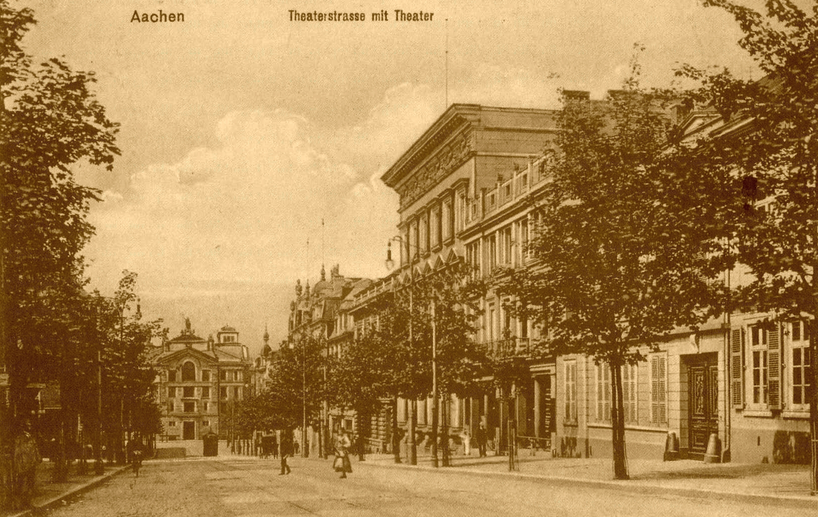 Theaterstraße mit Blick auf das Theater. Das hohe Gebäude (rechts) ist der Sitz der Reichsbank.